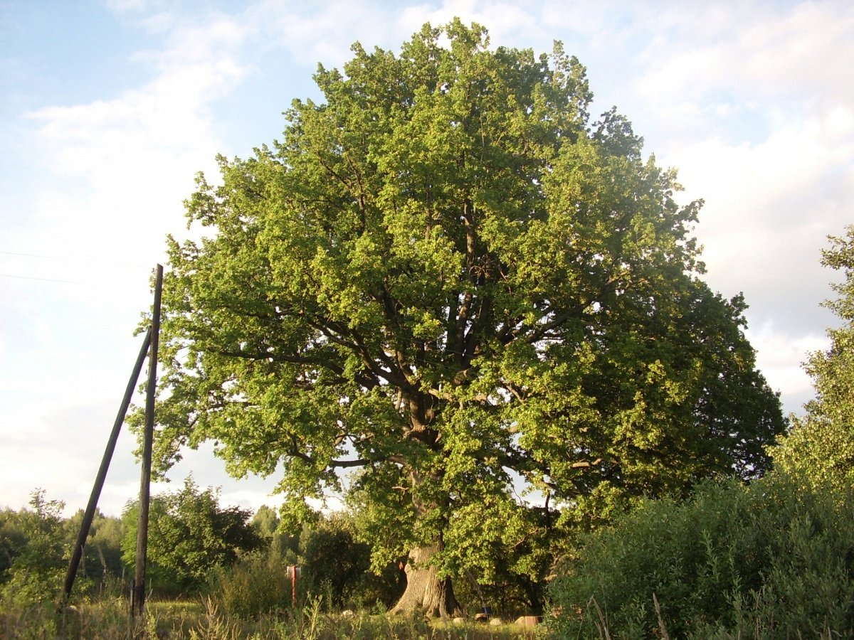 Тадуліна. Цар-дуб